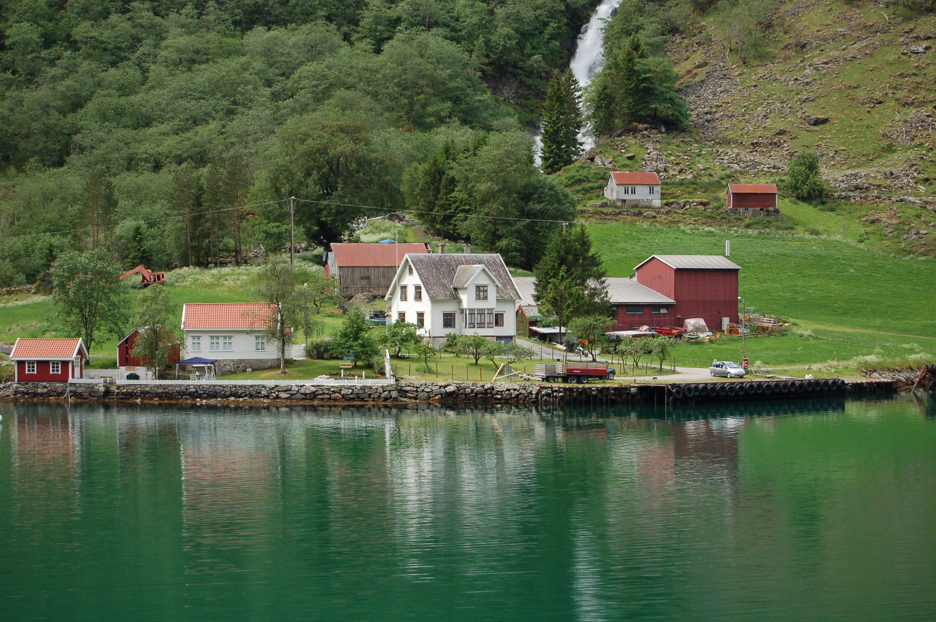 The farm Tufto by Nærøyfjorden